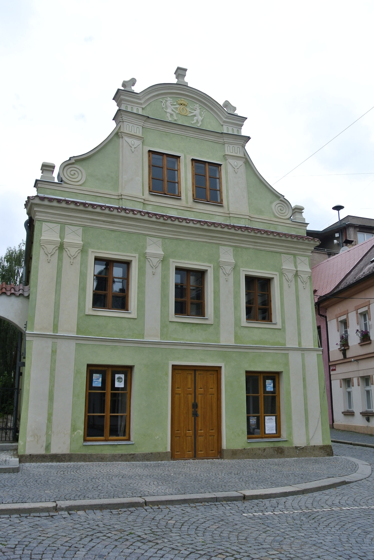 Rehabilitace městského domu č.p. 194 stojícího na pomezí středověké a novověké polohy náměstí v Chotěboři zdárně pokračuje.